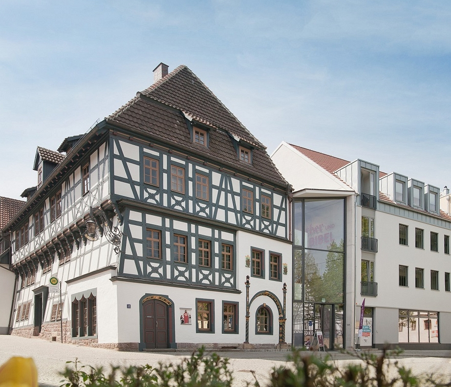 Lutherhaus Eisenach im Jahr 2016